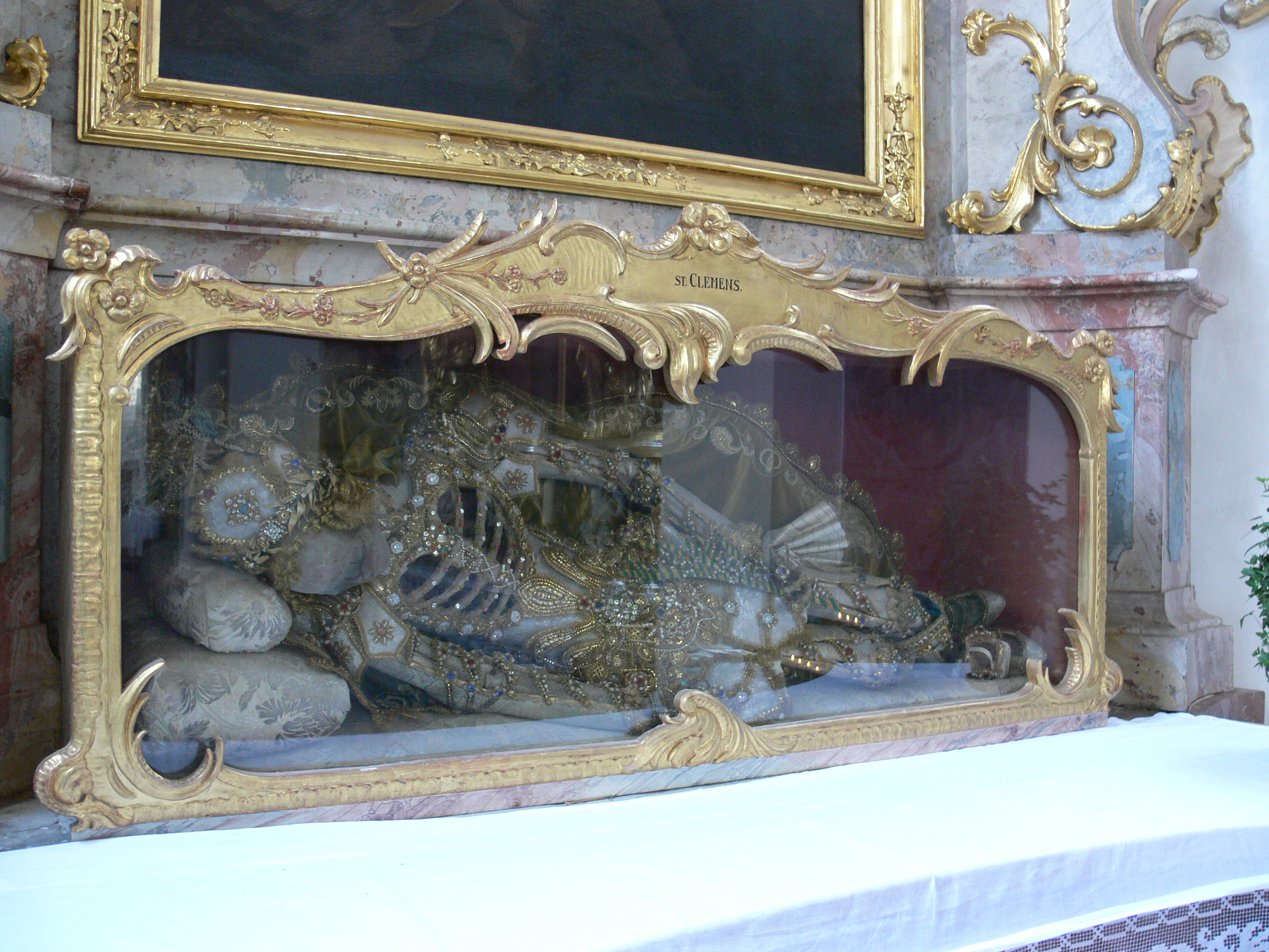 Sarkophag eines Katakombenheiligen („St. Clemens“) Pfarrkirche St. Gallus und Ulrich Kißlegg, Landkreis Ravensburg, Baden-Württemberg, Deutschland